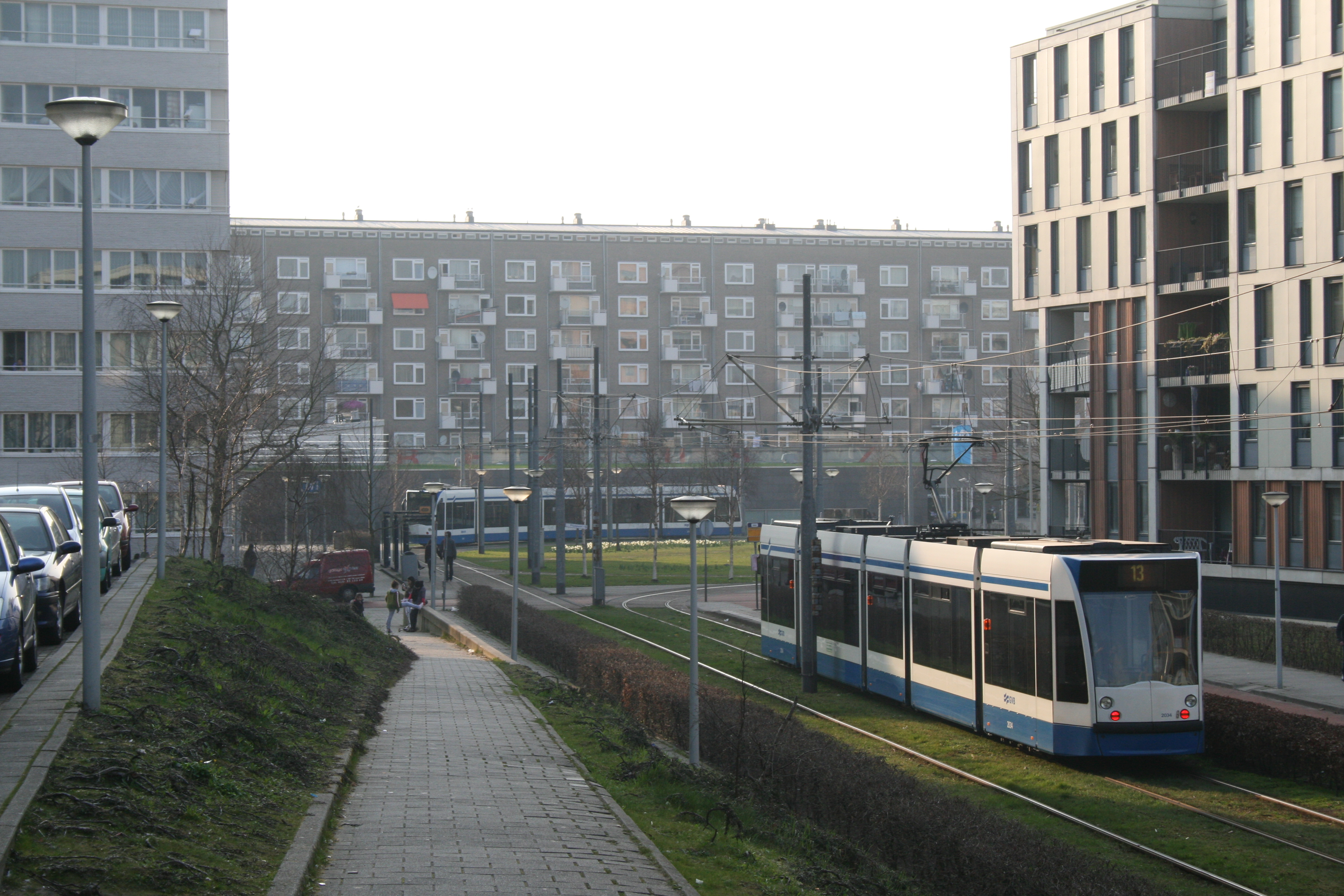 Het eindpunt van tramlijn 13 bij het Lambertus Zijlplein in Geuzenveld. De flat op de achtergrond is gebouwd naar een ontwerp van Willem Dudok